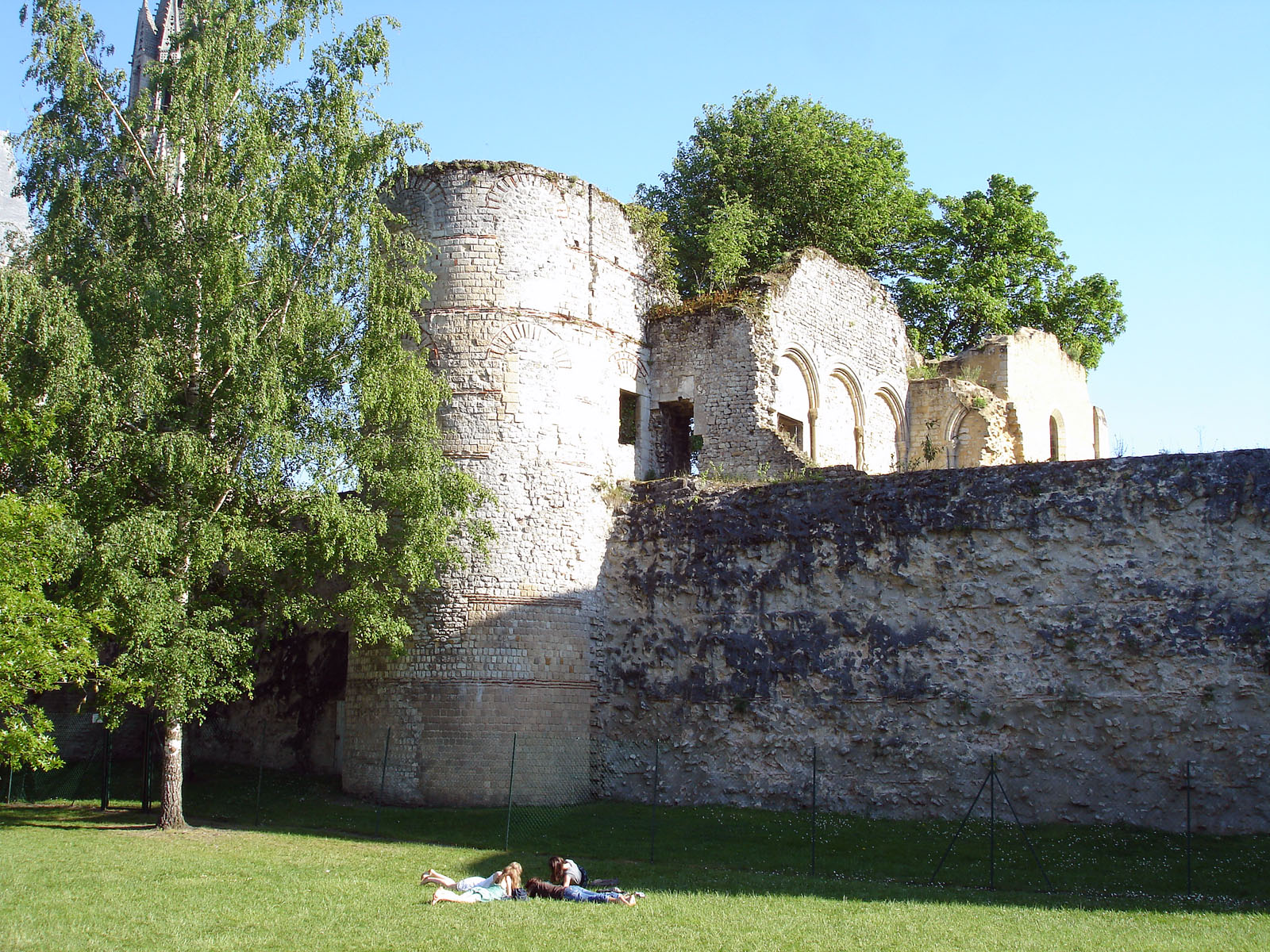 Le jardin du Roy à Senlis, Oise, France. Au fond, le rempart du IIIe siècle avec la tour n° 29 ou « tour des Gardes », et les vestiges du château royal.